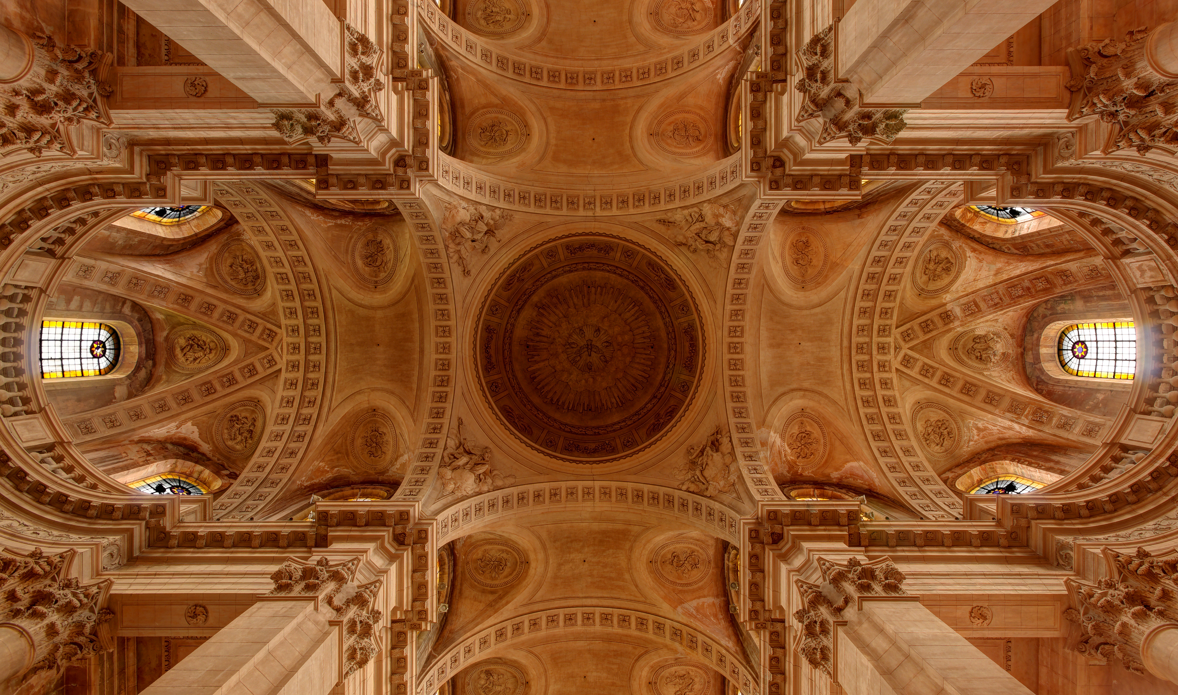 Abbaye de Guebwiller (HDR). Monument classé Monument Historique sous le n° PA00085438.